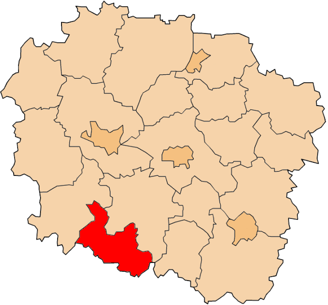 Powiat mogileński na mapie województwa kujawsko-pomorskiego.